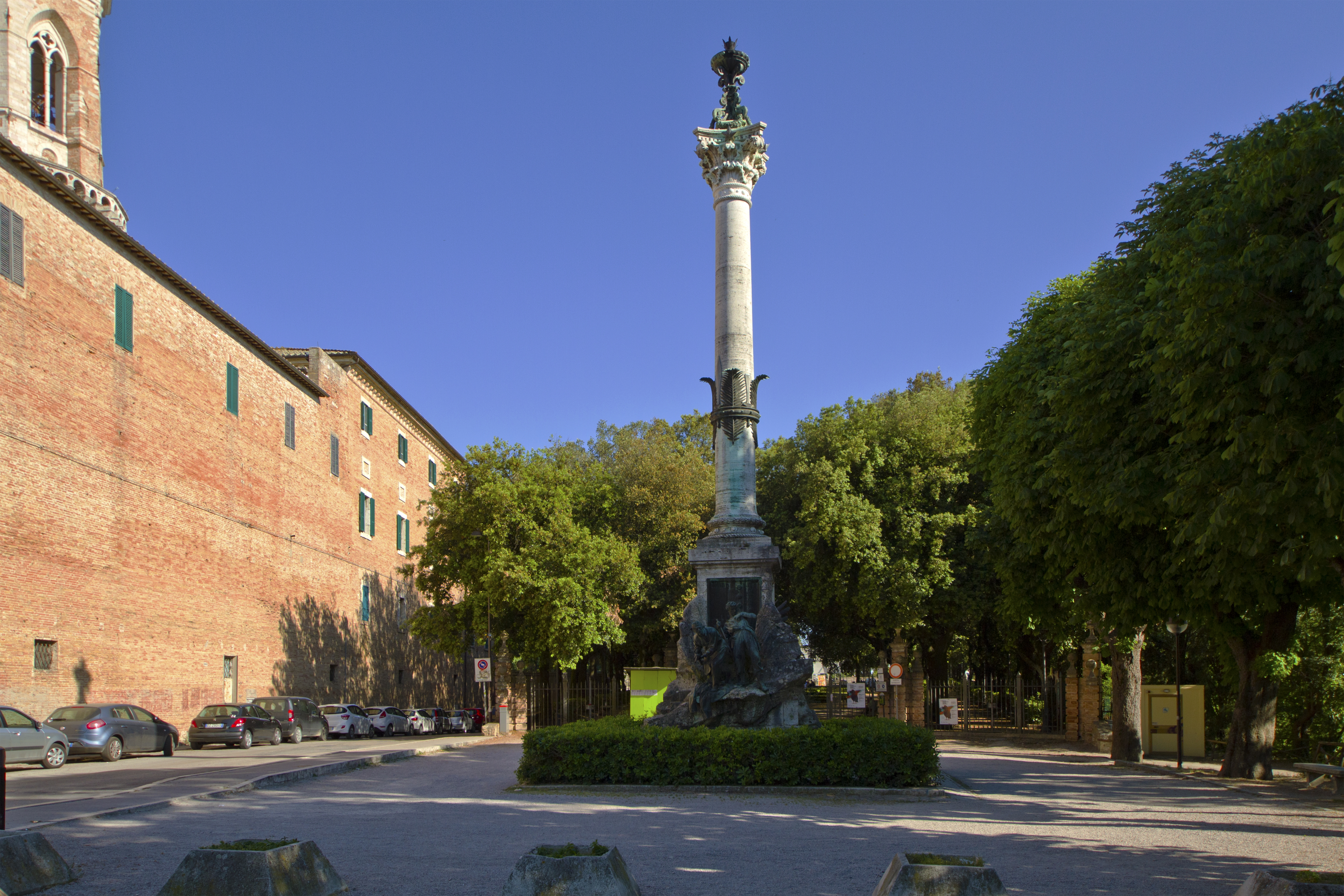 Perugia, Italy